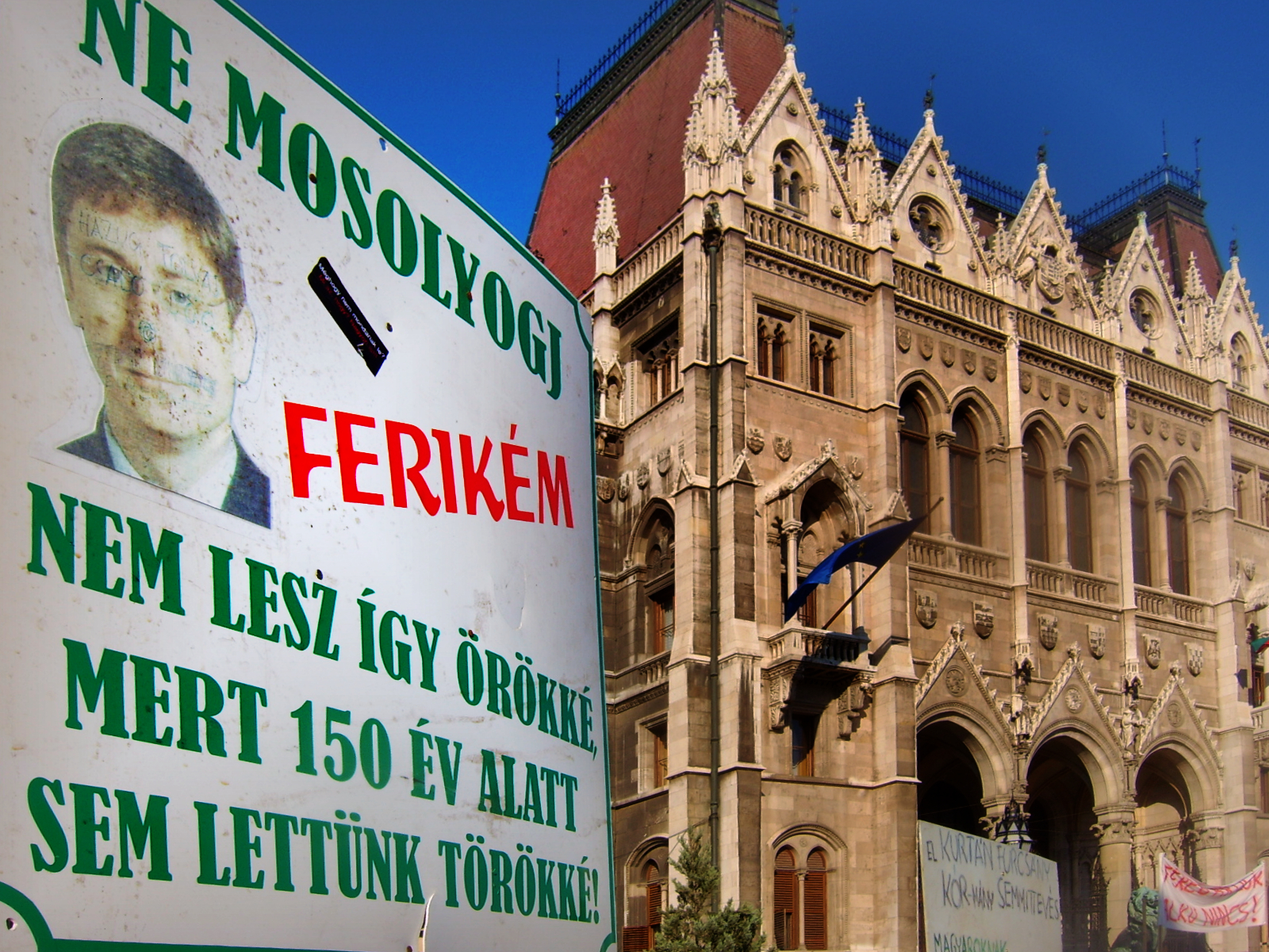 Protesty w Budapeszcie, jesień 2006